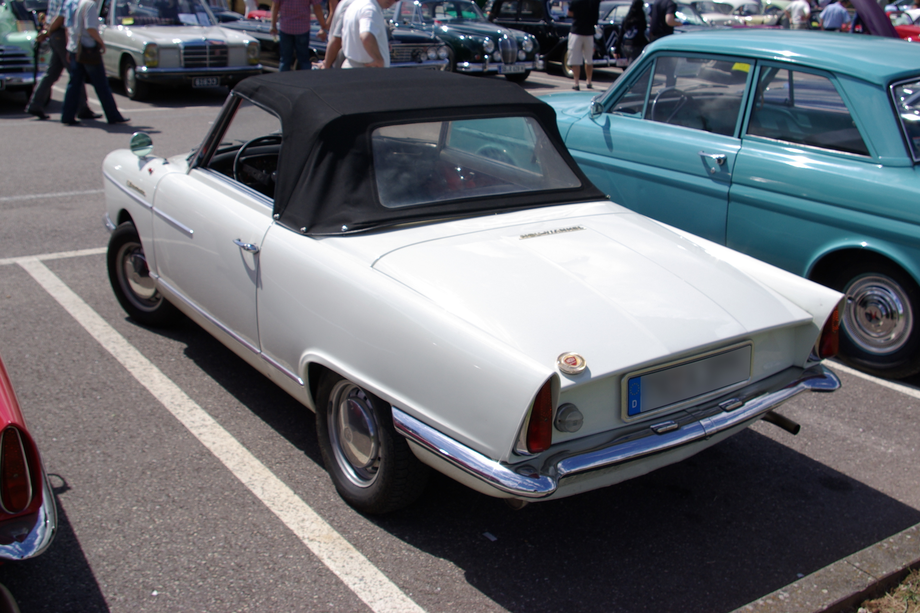 NSU Wankel Spider, Baujahr 1967, 50 PS , aufgenommen bei / photographed at "Internationales Konzer Oldtimer-Treffen" am 20. Juli 2008